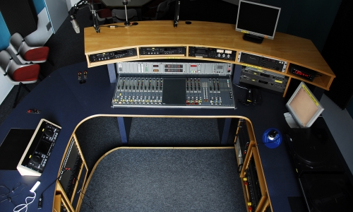 Das große Hörfunkstudio von Alex Offener Kanal Berlin